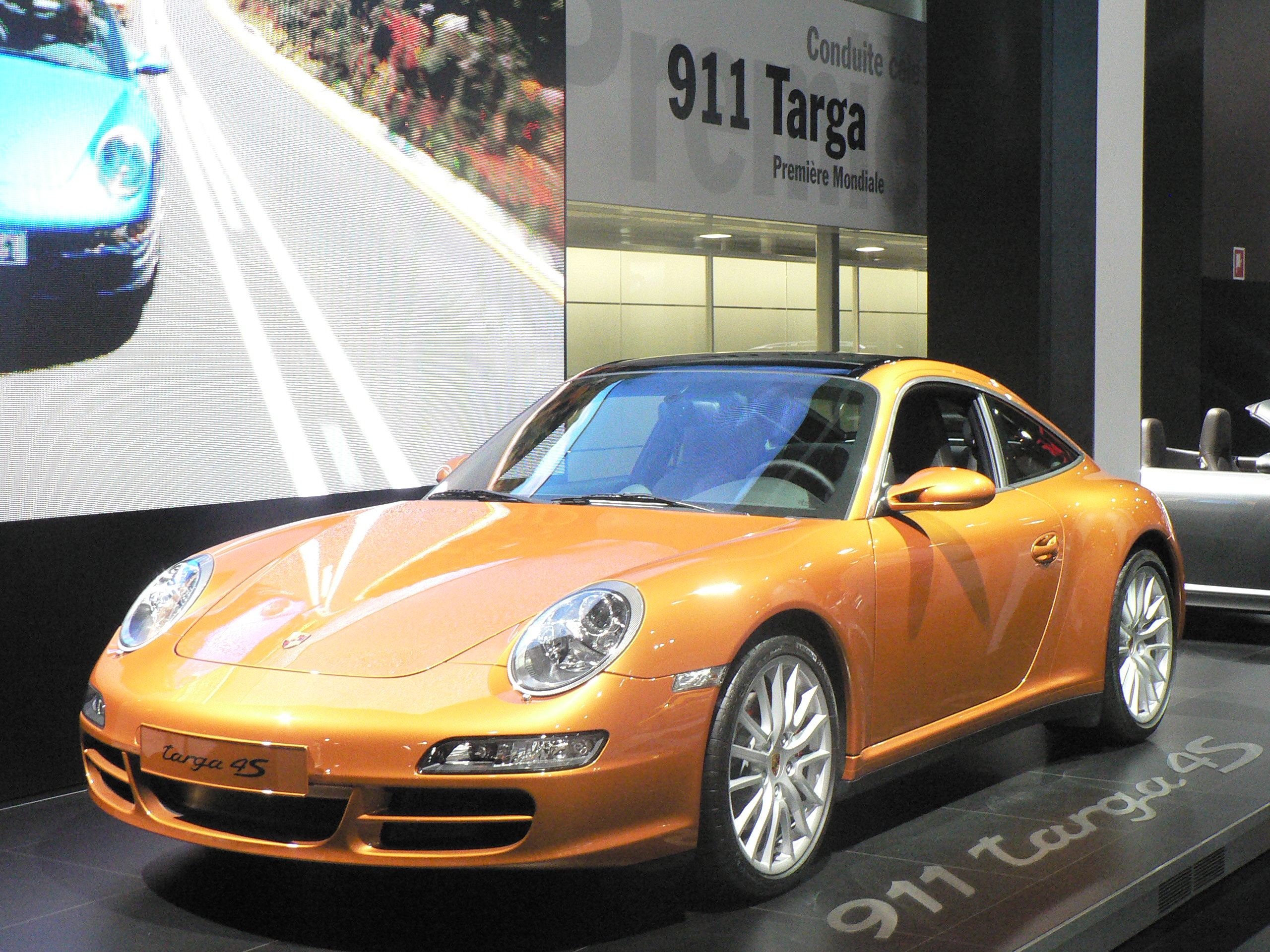 Mondial de l automobile de Paris (October 2006)